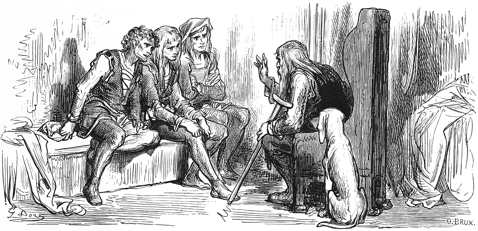 grafika z książki PL Bajki, Jean de La Fontaine, nakładem i drukiem Jana Noskowskiego, Warszawa 1876